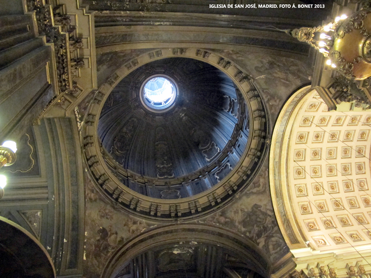 Vista desde el crucero de la iglesia de San José en Madrid, hacia la cúpula.